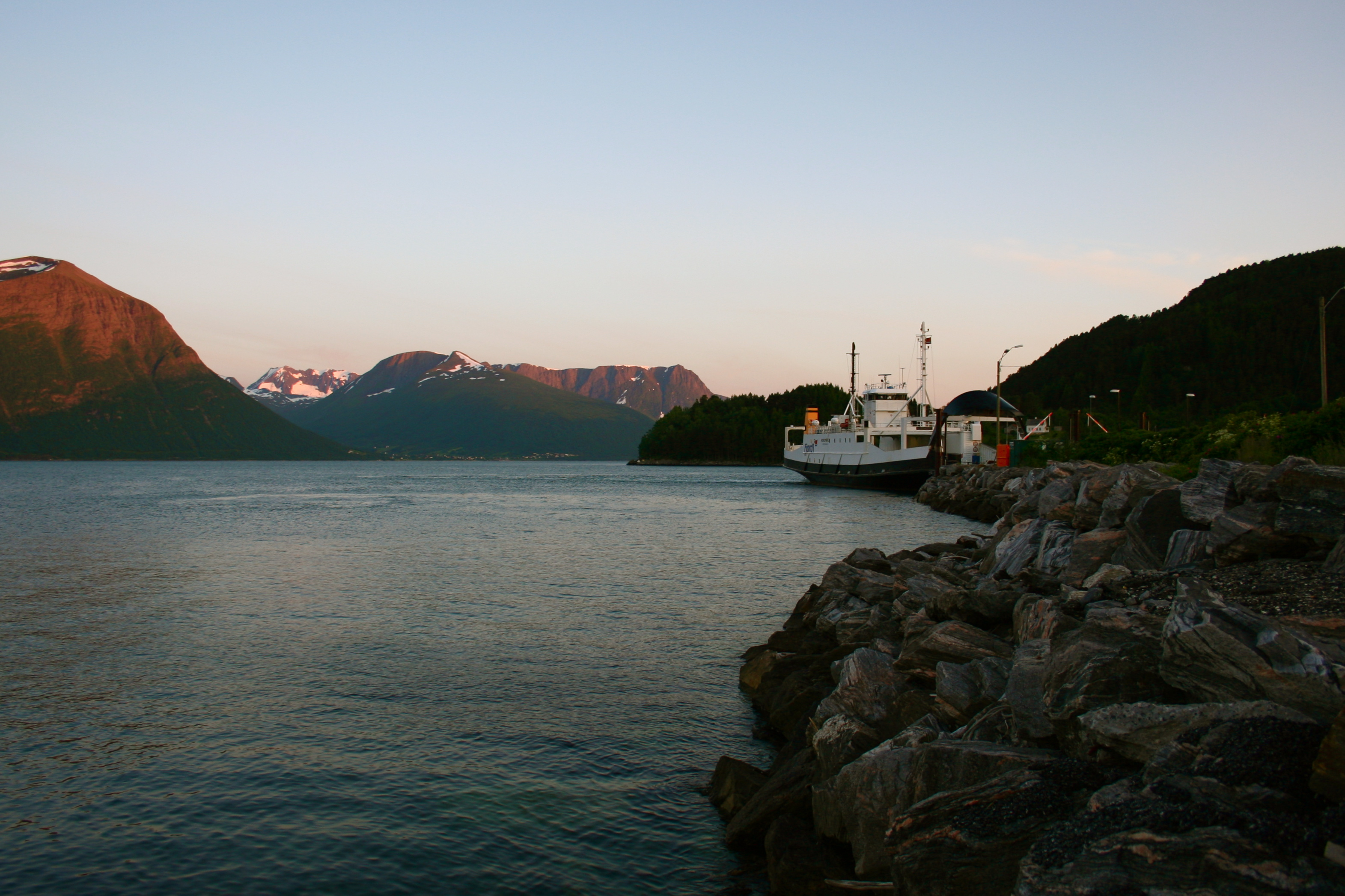 Sunde Fergekai, Sula Kommune, Solevåg, Sula, Norge